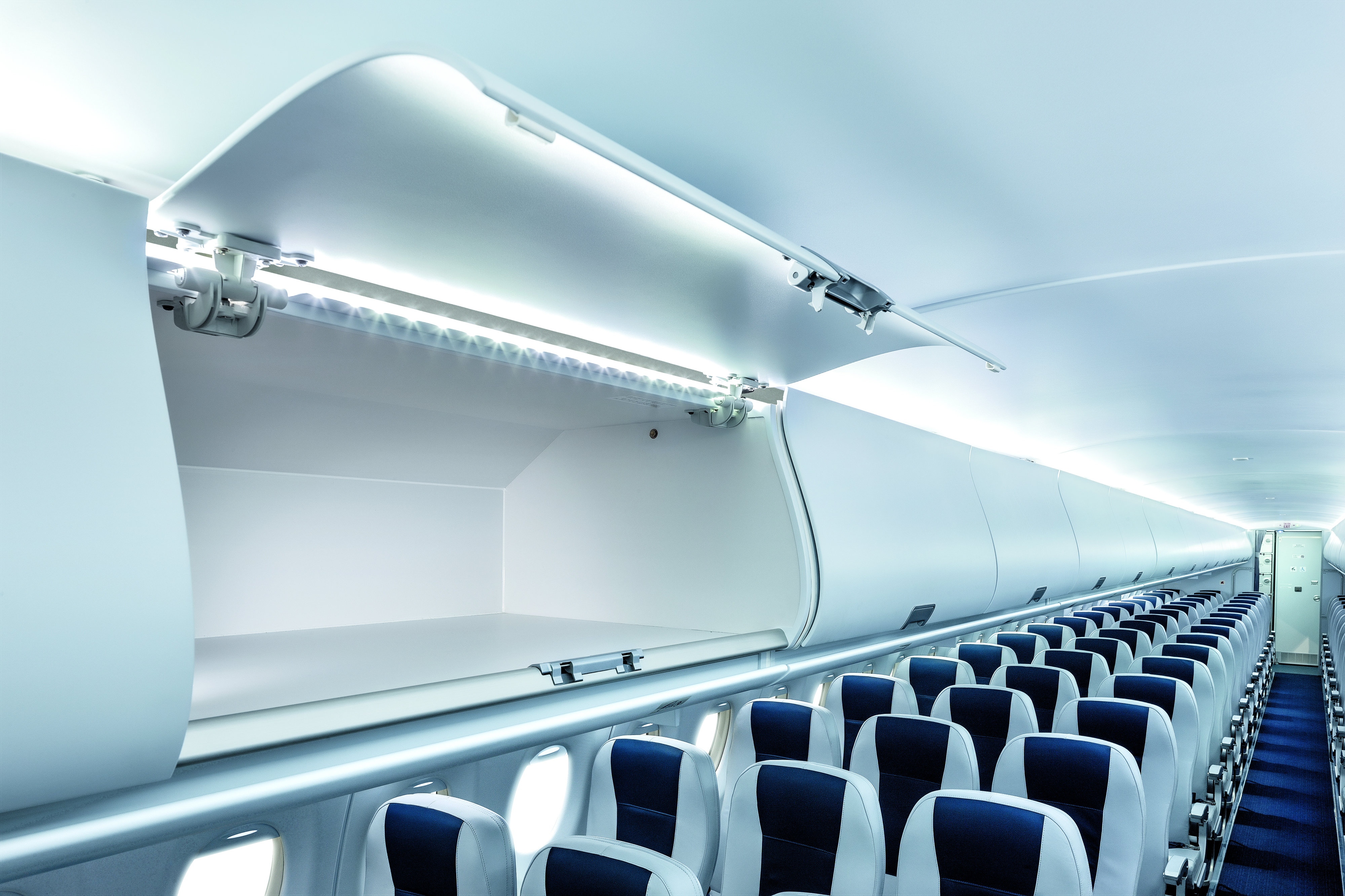 Passenger cabin of an Interjet Sukhoi Superjet